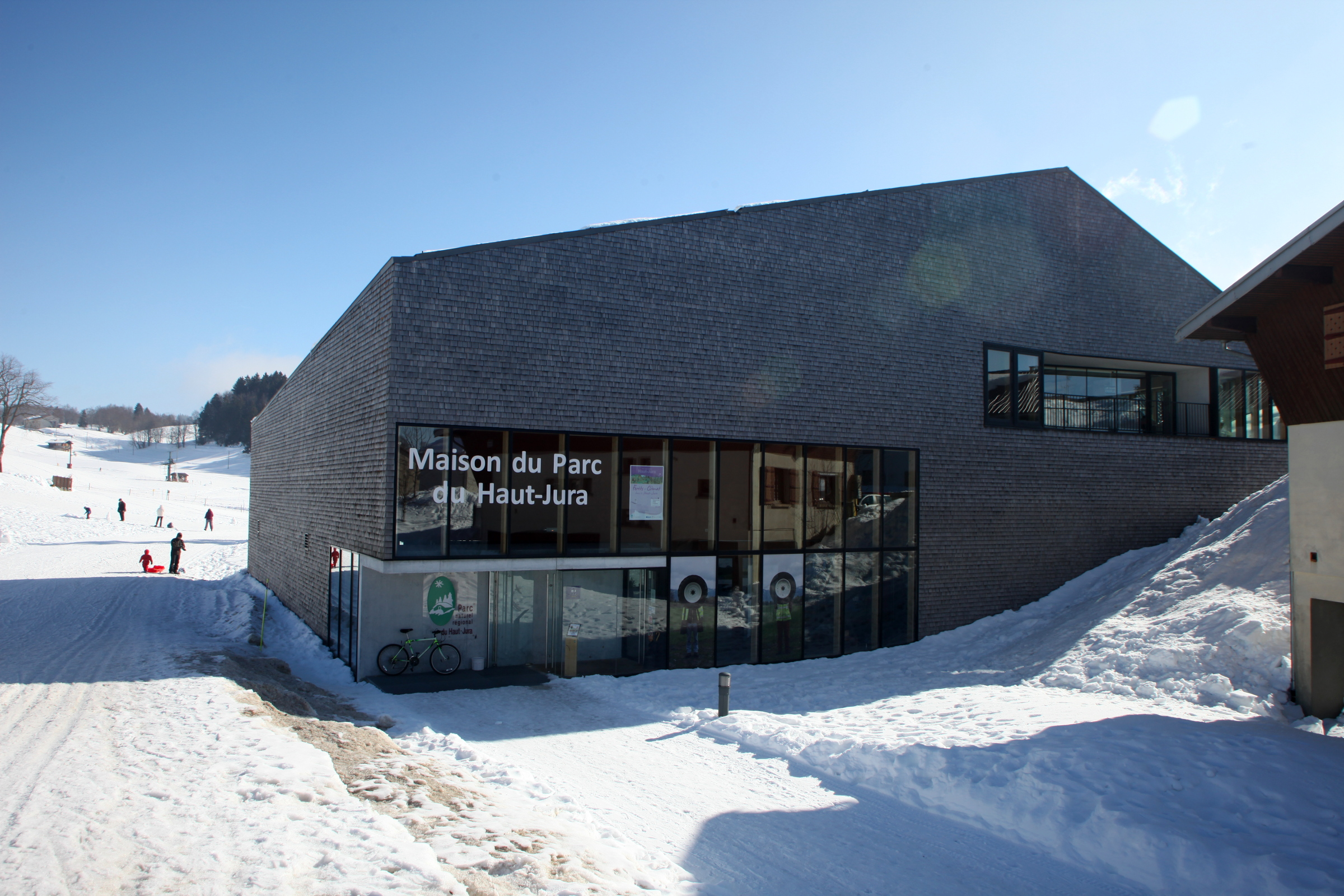 Entrée de la Maison du Parc du Haut-Jura à Lajoux